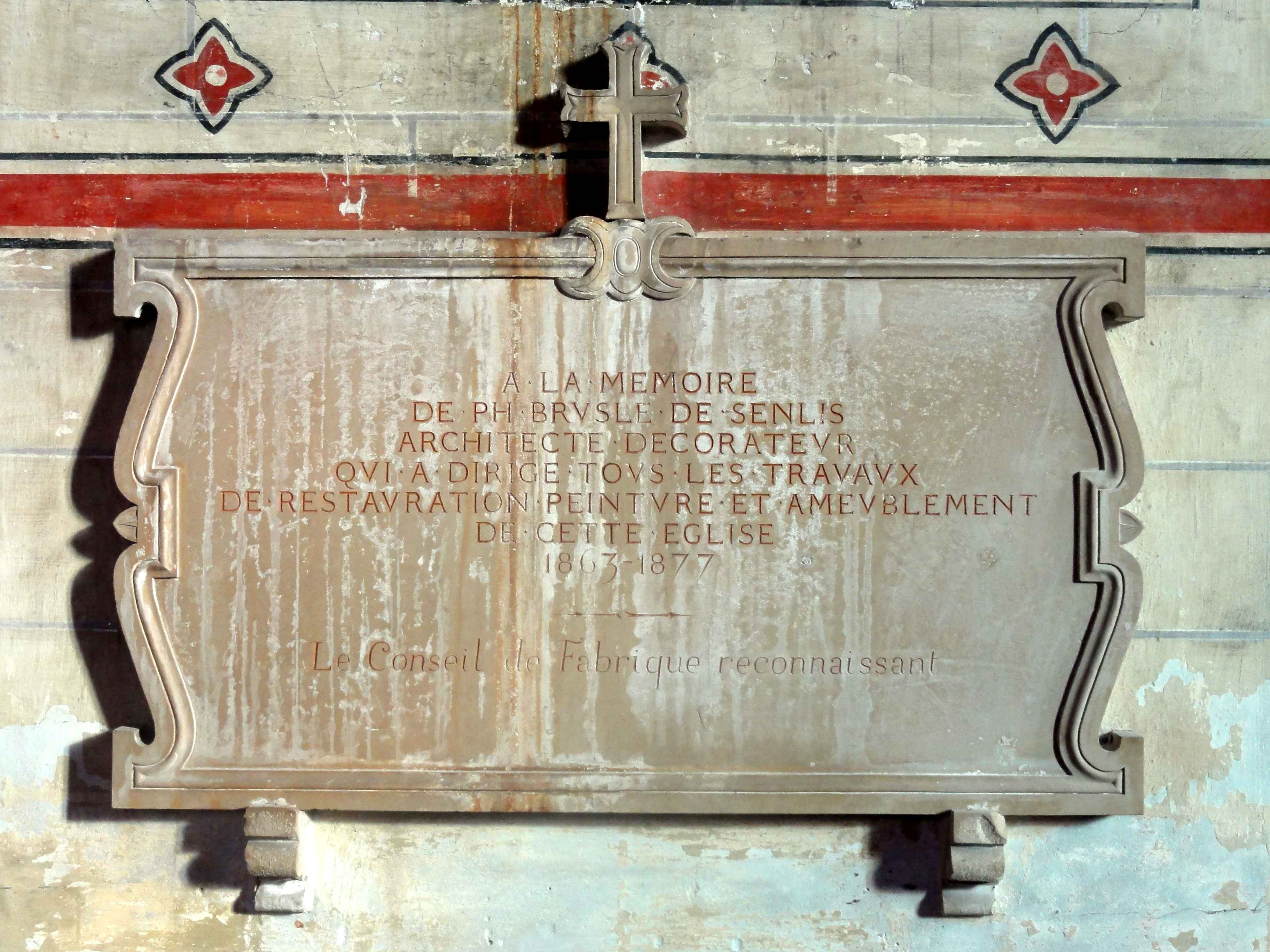 Plaque commémorative pour l'architecte Ph. Bruslé.